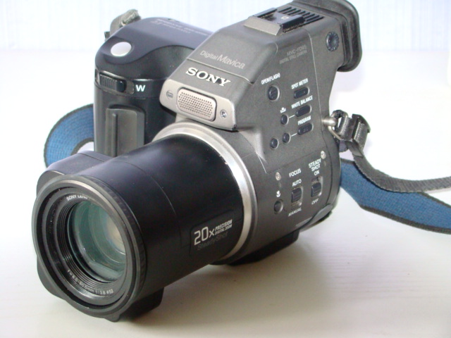 Appareil photographique numérique Sony Mavica MVC-FD95